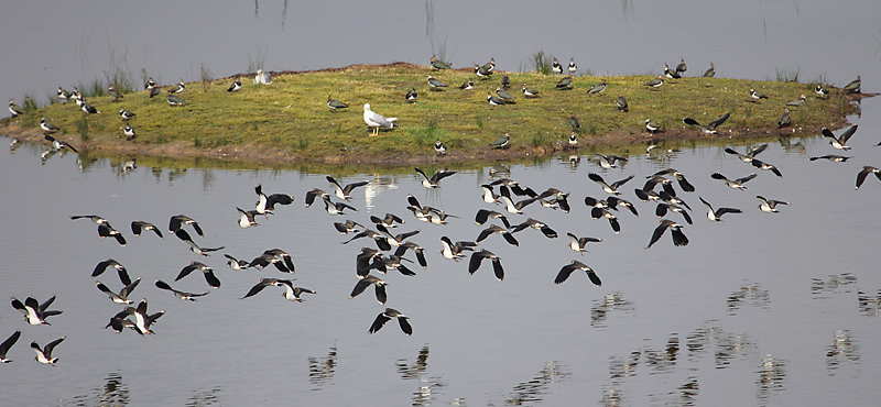 Grupo de avefrías en el humedal de Orueta, frente a Urdaibai Bird Center.